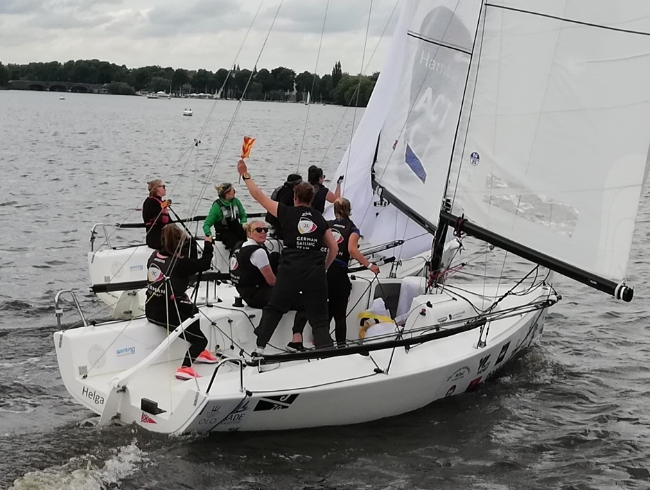 Helga Cup 2019, J/70, Vordergrund Helga GER 57, Namensgeberin für den Helga Cup, Bahn: Active City, Hamburg, Außenalster